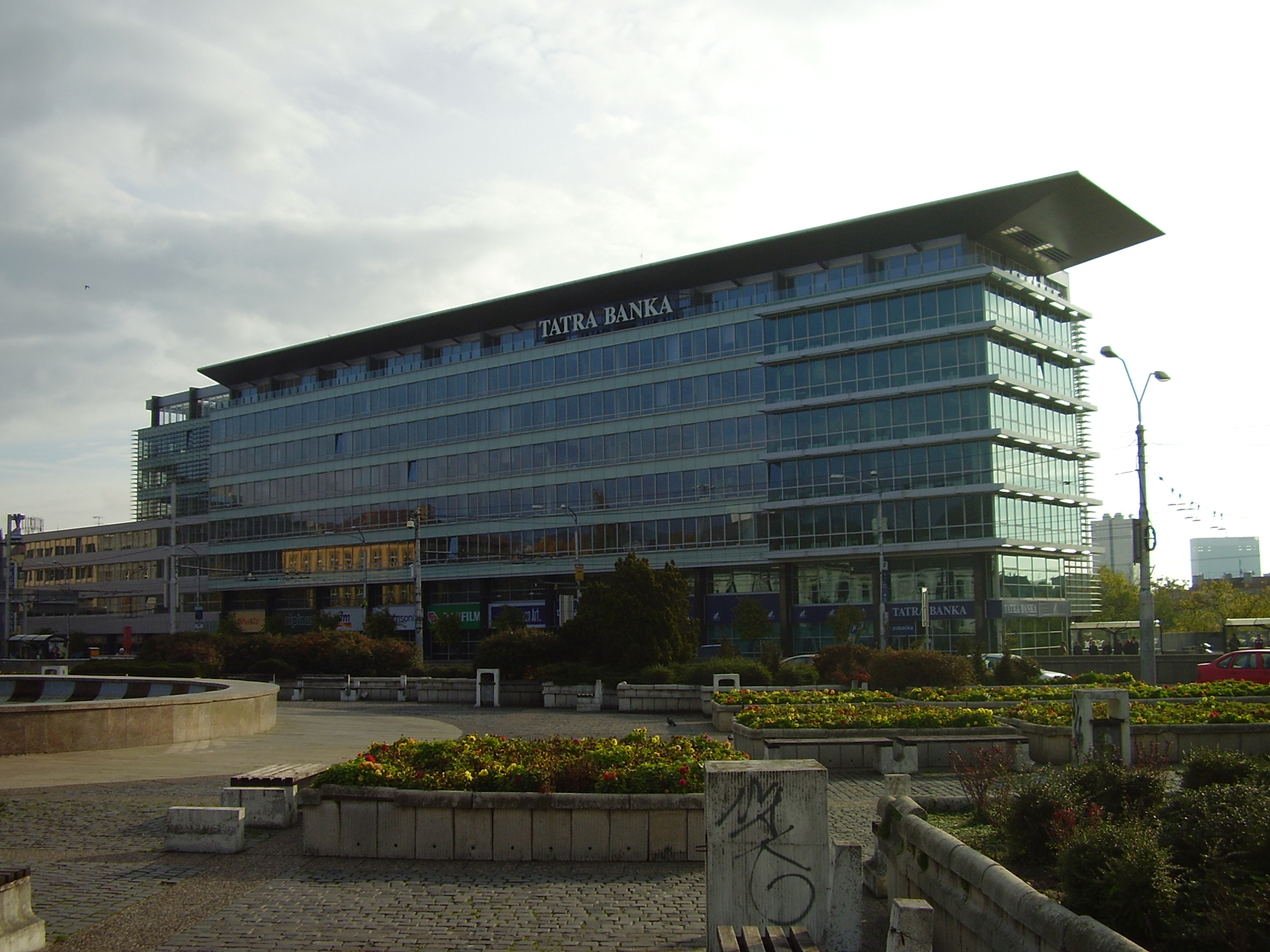 Tatracentrum at Hodžovo námestie in Bratislava